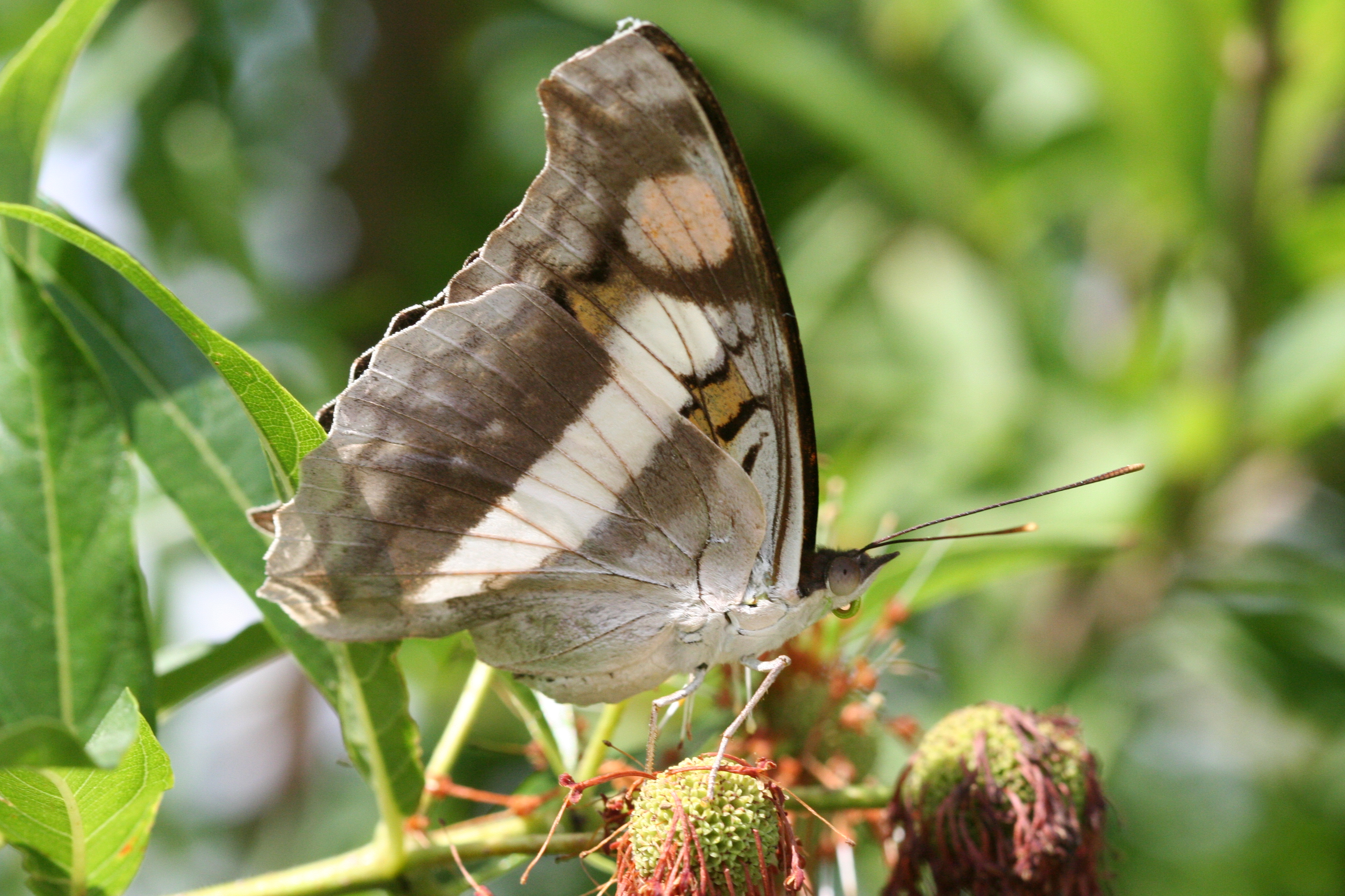 Silver emperor (Doxocopa laure) female